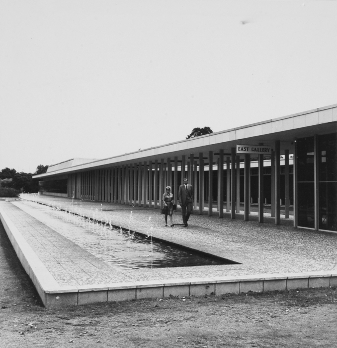 Het Pretoriase Kunsmuseum richt zich op Zuid-Afrikaanse kunst. In januari 1962 begon men met de bouw, de hoeksteen werd op 19 oktober datzelfde jaar gelegd door eerste minister H.F. Verwoerd en burgemeester E. Smith. Op 20 mei 1964 werd het museum officieel geopend.